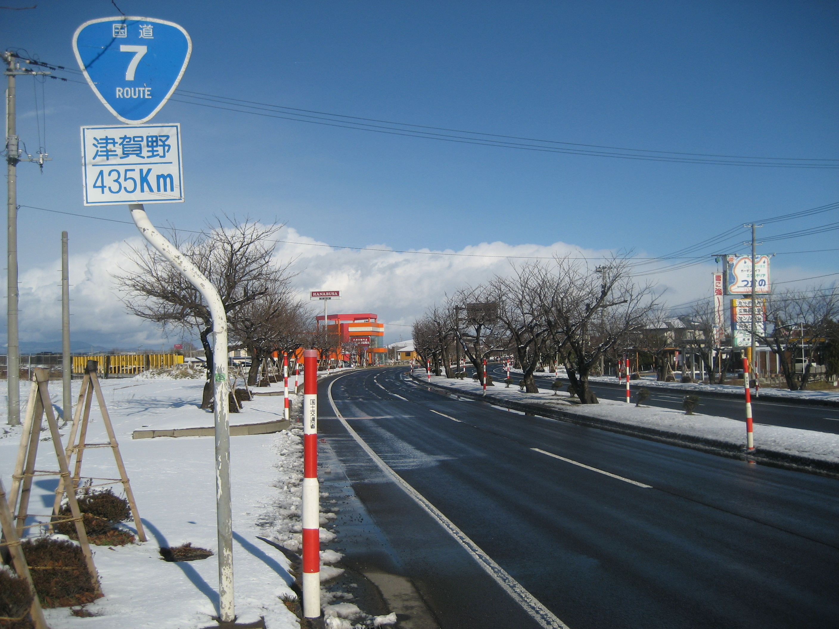 国道7号線弘前バイパス青森県弘前市津賀野付近（青森市方向を撮影）